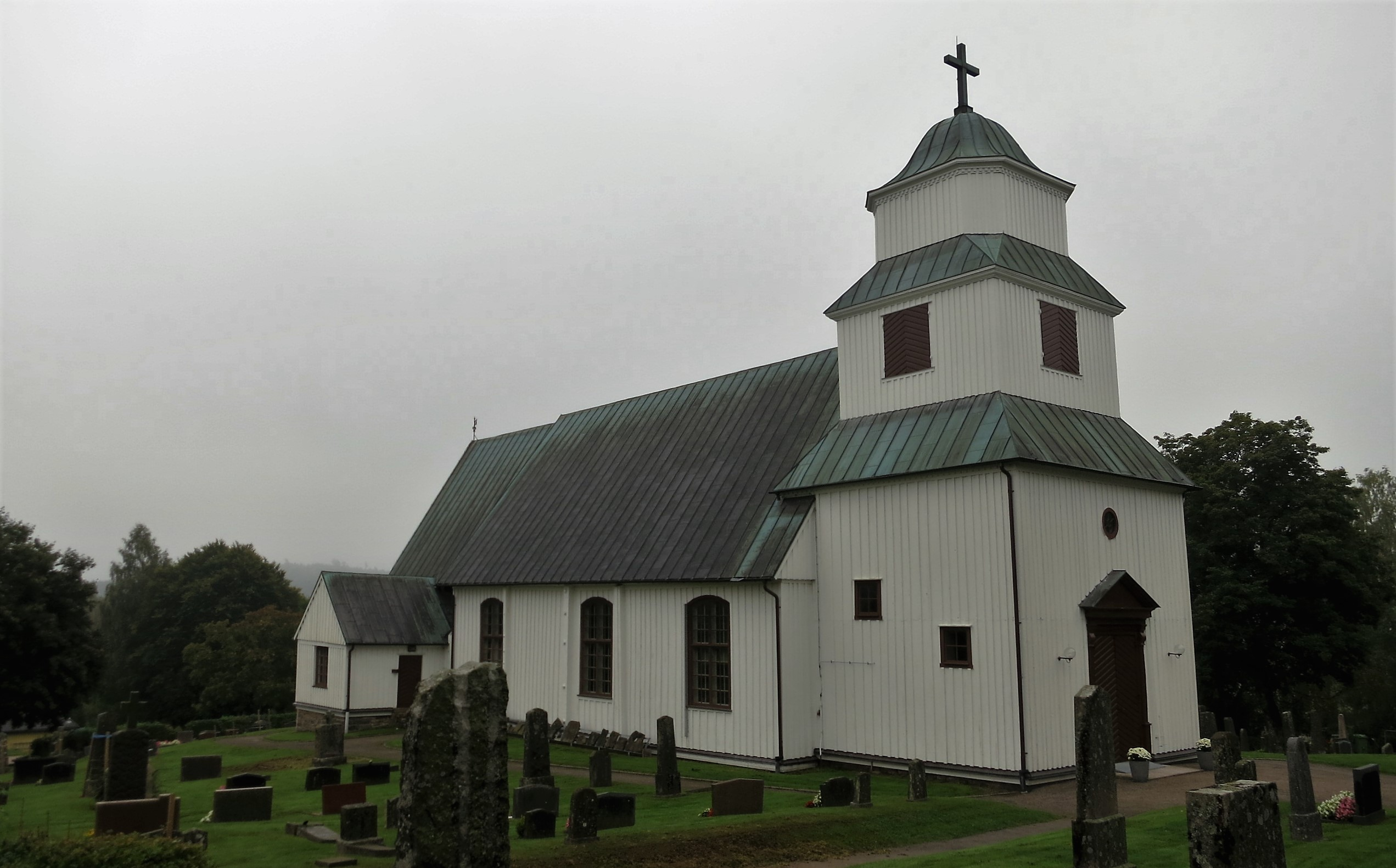 Gunnarps kyrka